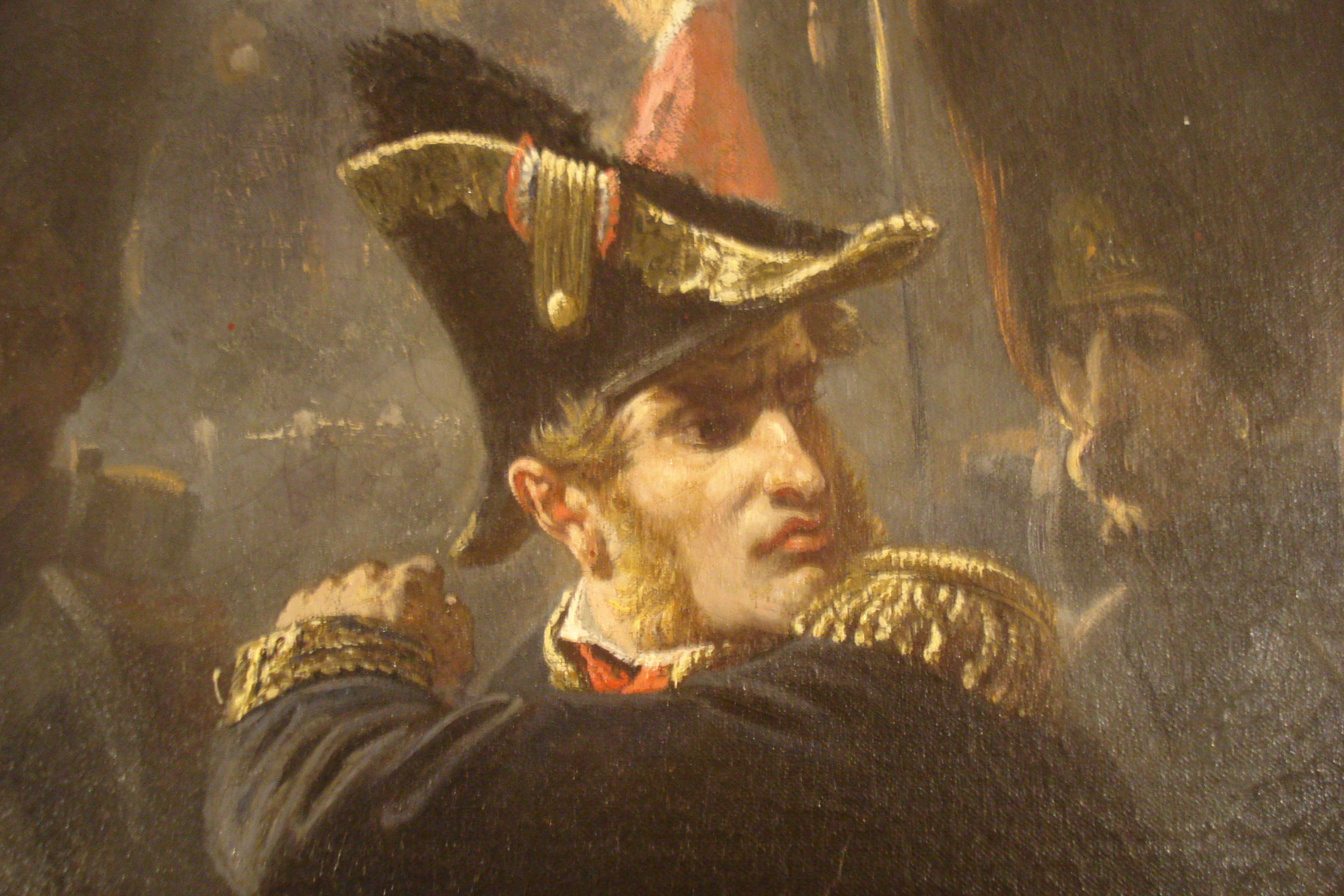 Le plus célèbre et le plus grand tableau d'Armand Dumaresq (2,50m x 1,50 m) commandé par Napoléon III pour l'Exposition Universelle de 1867. On y voit la rage du Général Cambronne et "le mot" de rage qu'il va lancer.